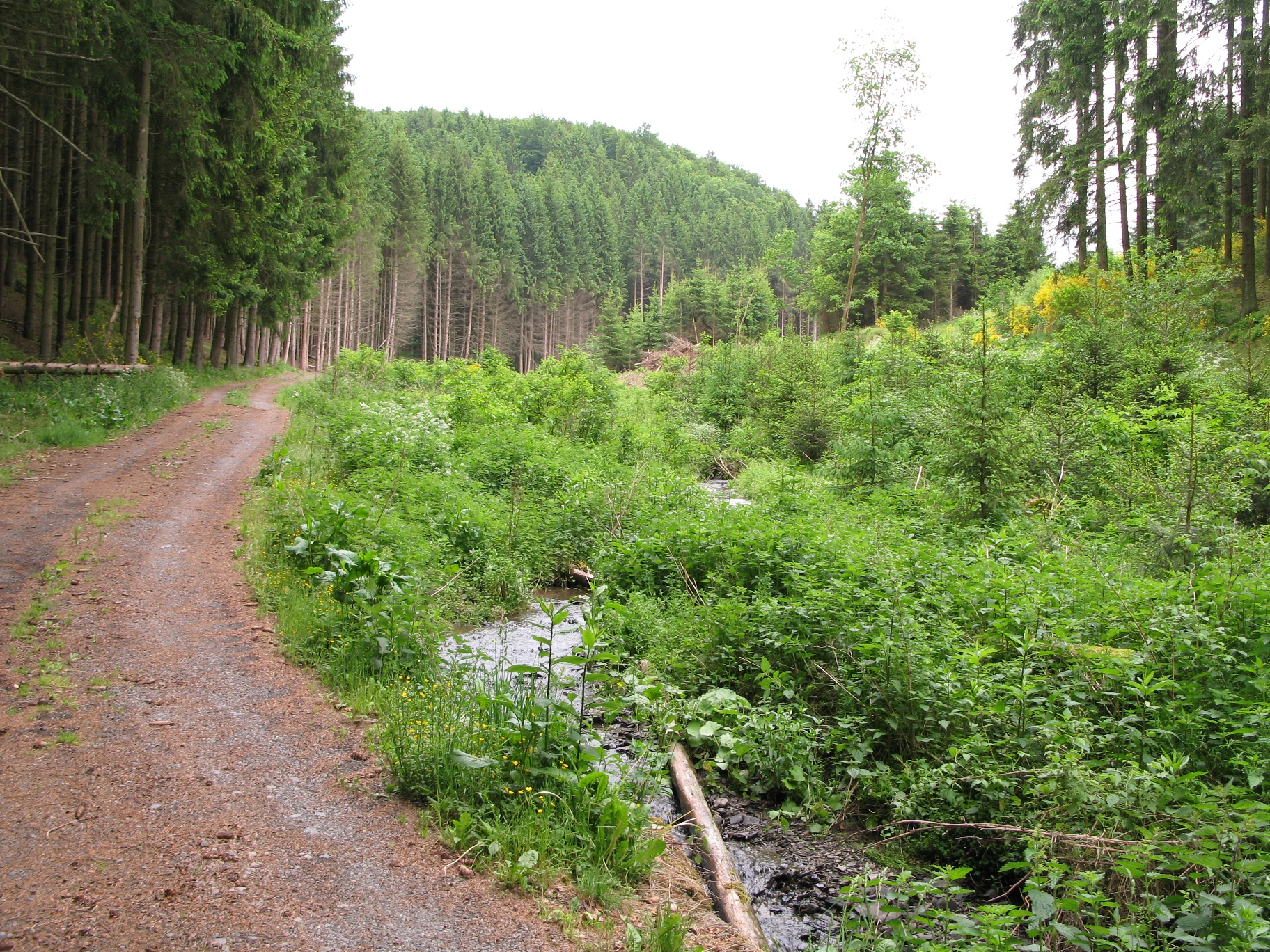 Den Dall vun der Rimmelbaach um Flouer Heineschleed am Mee 2008. Kategorie:Baachen zu Lëtzebuerg